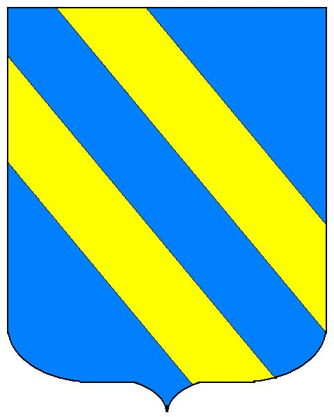 Grb obitelji Alberti